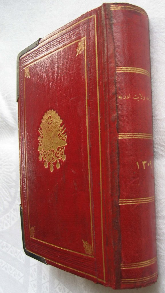 1892 tarihli Edirne Salnamesi, Şevket Dağdeviren (Cem Altınel koelksiyonu)